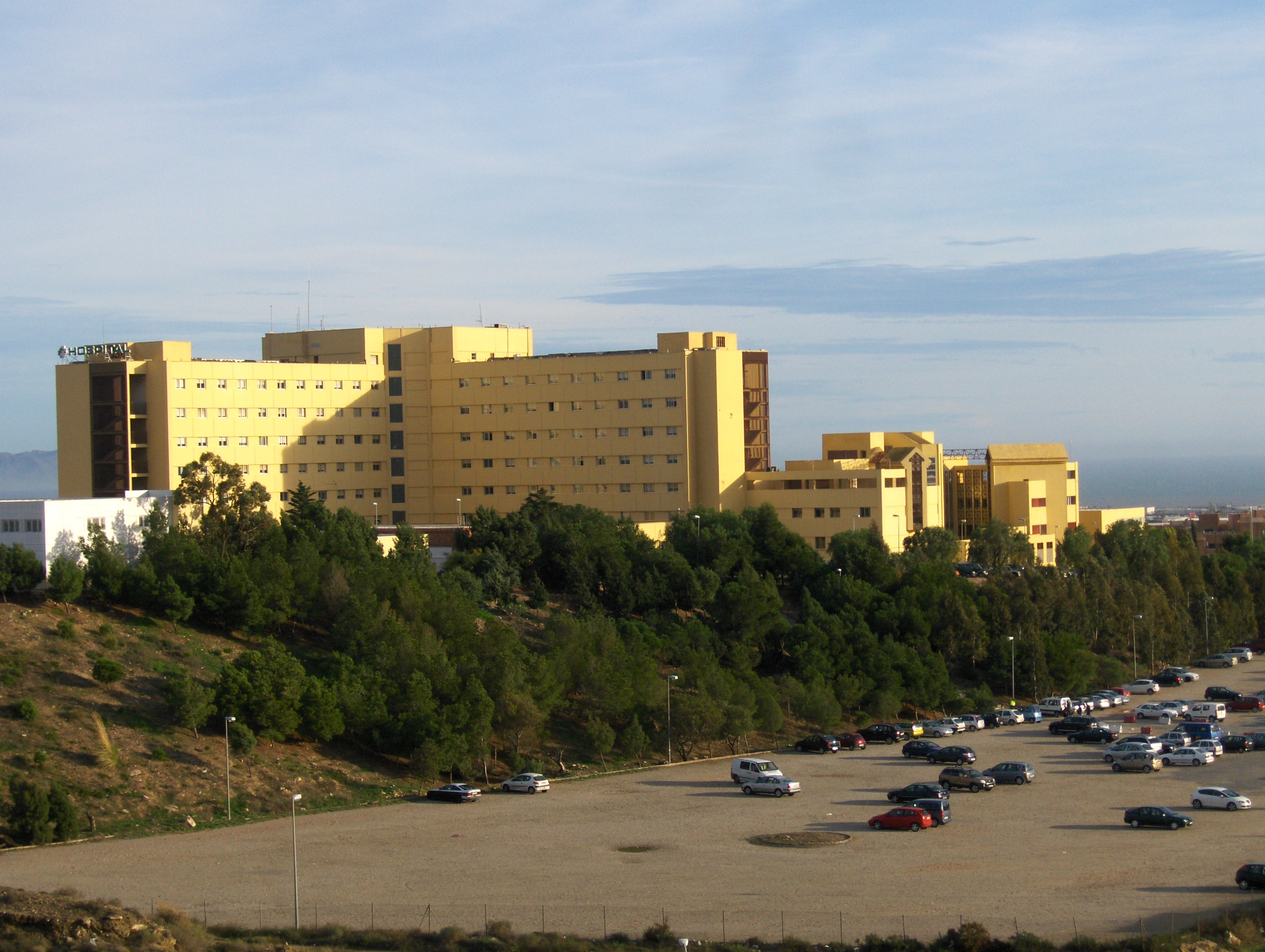 Hospital Torrecárdenas de Almería, desde el Oeste